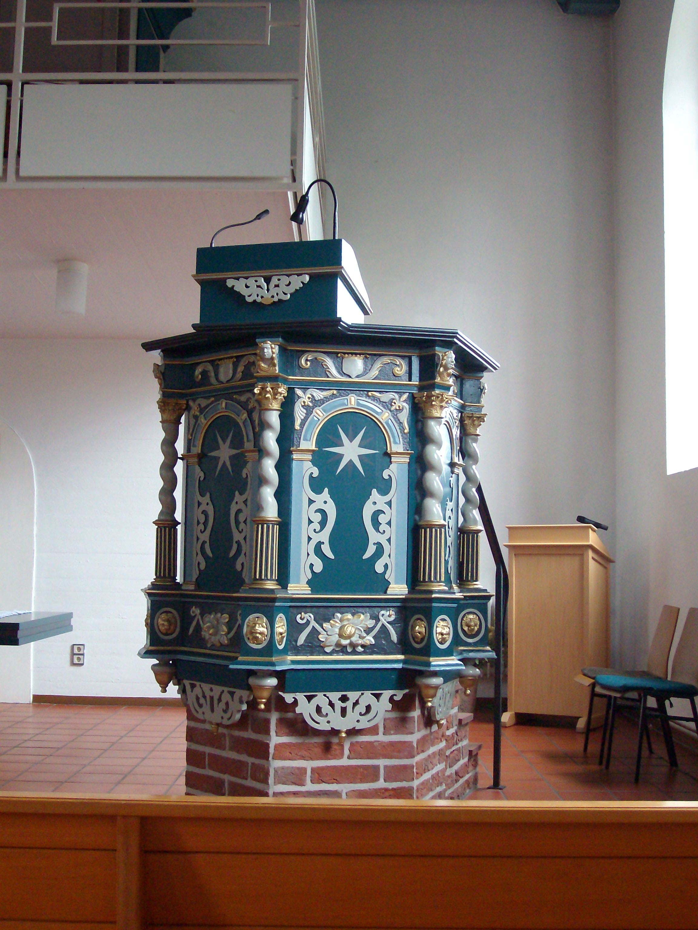 Kanzel der Reformierten Kirche in Neermoor